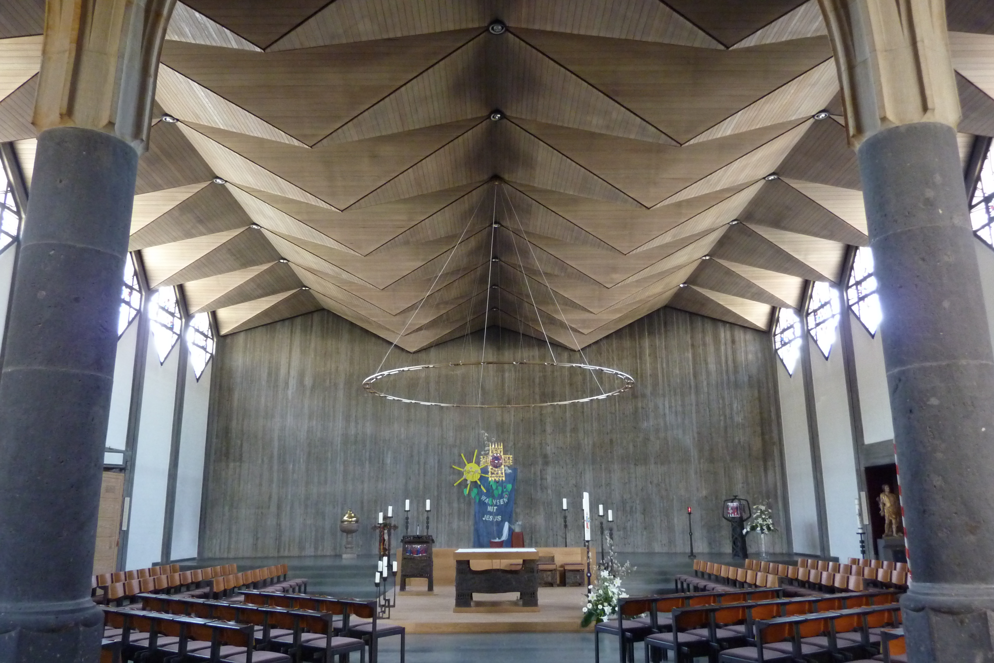 Kirche St. Sebastianus in Bad Bodendorf, Neubau